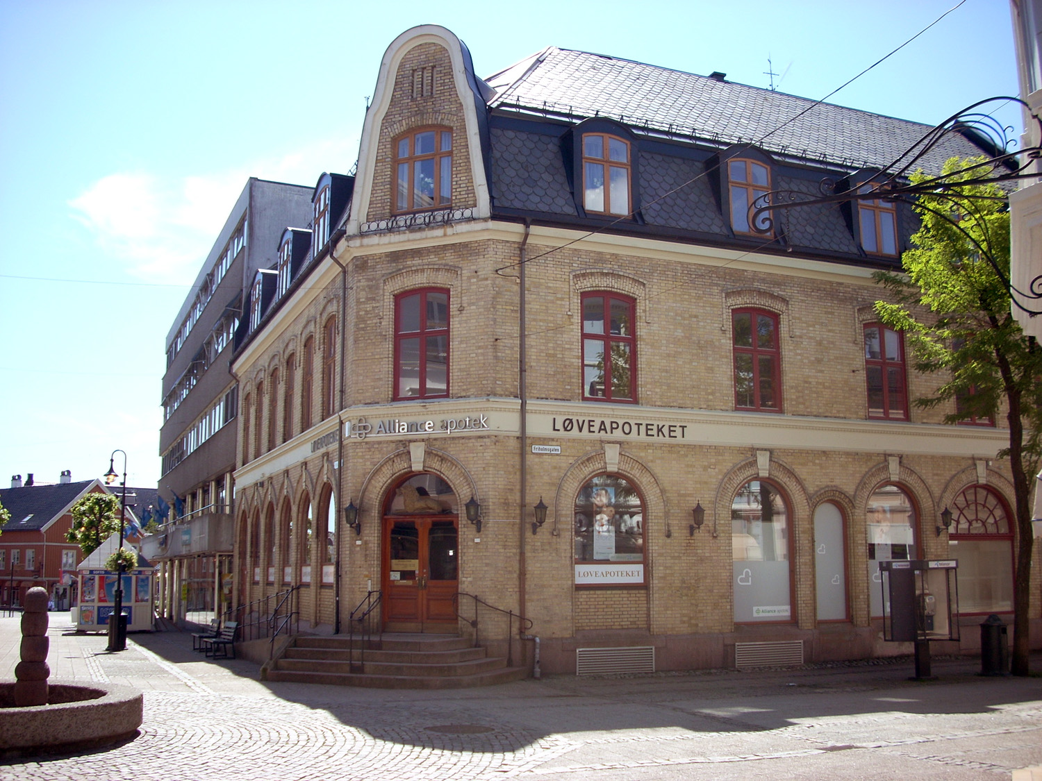 Gamle Løveapoteket i Arendal, nå Alliance apotek